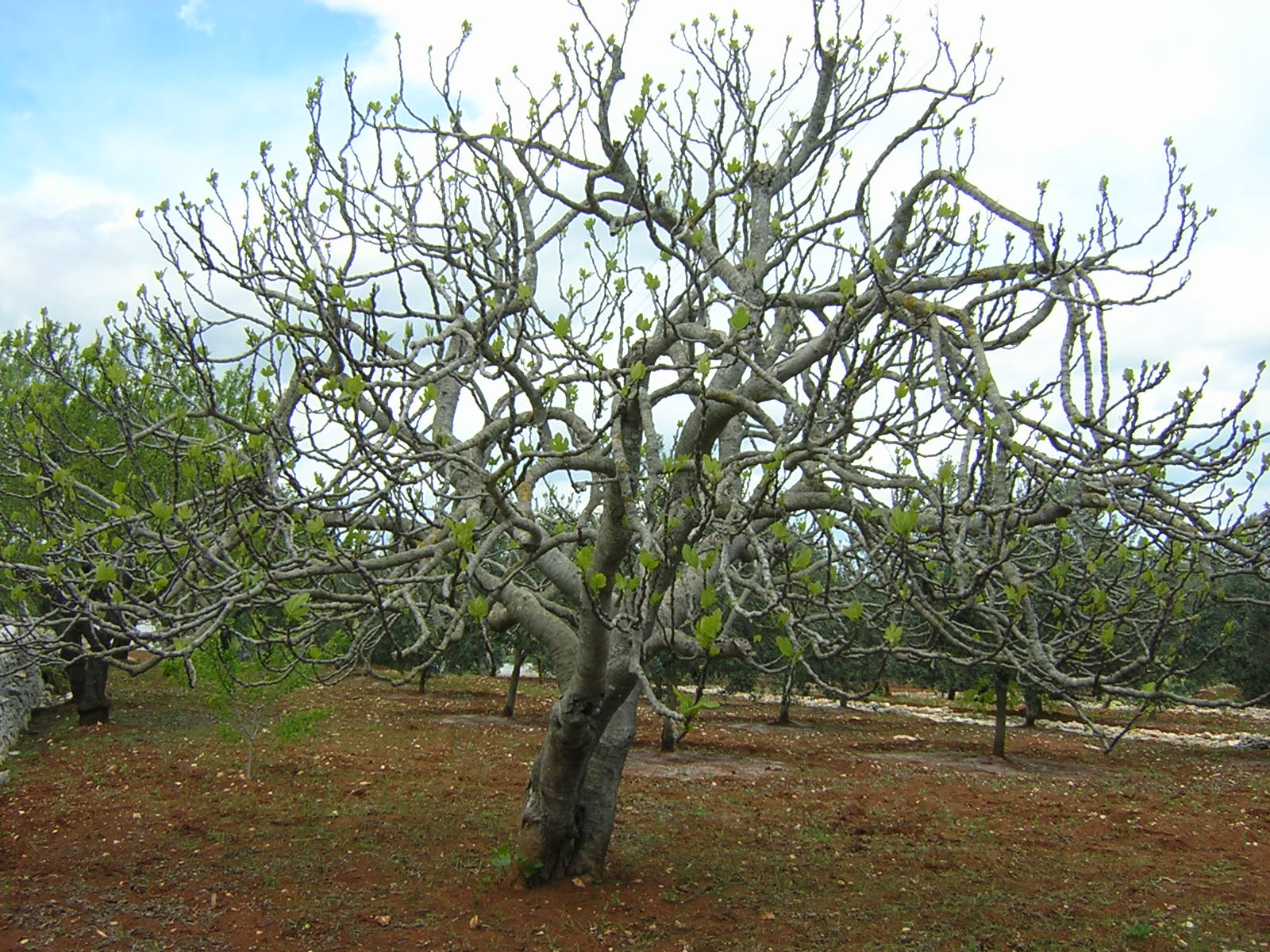 Austreibender Feigenbaum